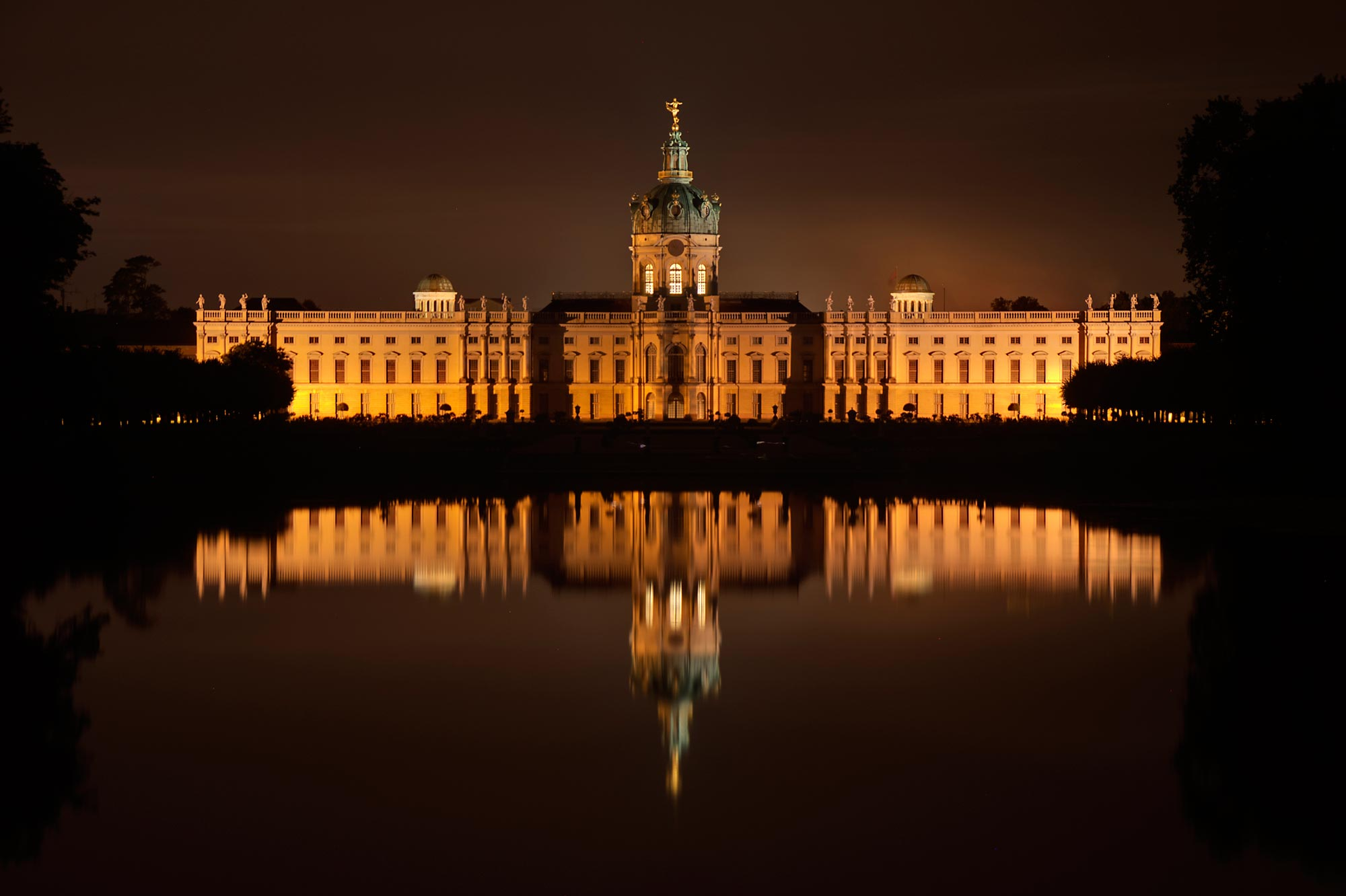 Die Nordseite des Schlosses Charlottenburg spiegelt sich bei Nacht im Karpfenteich.